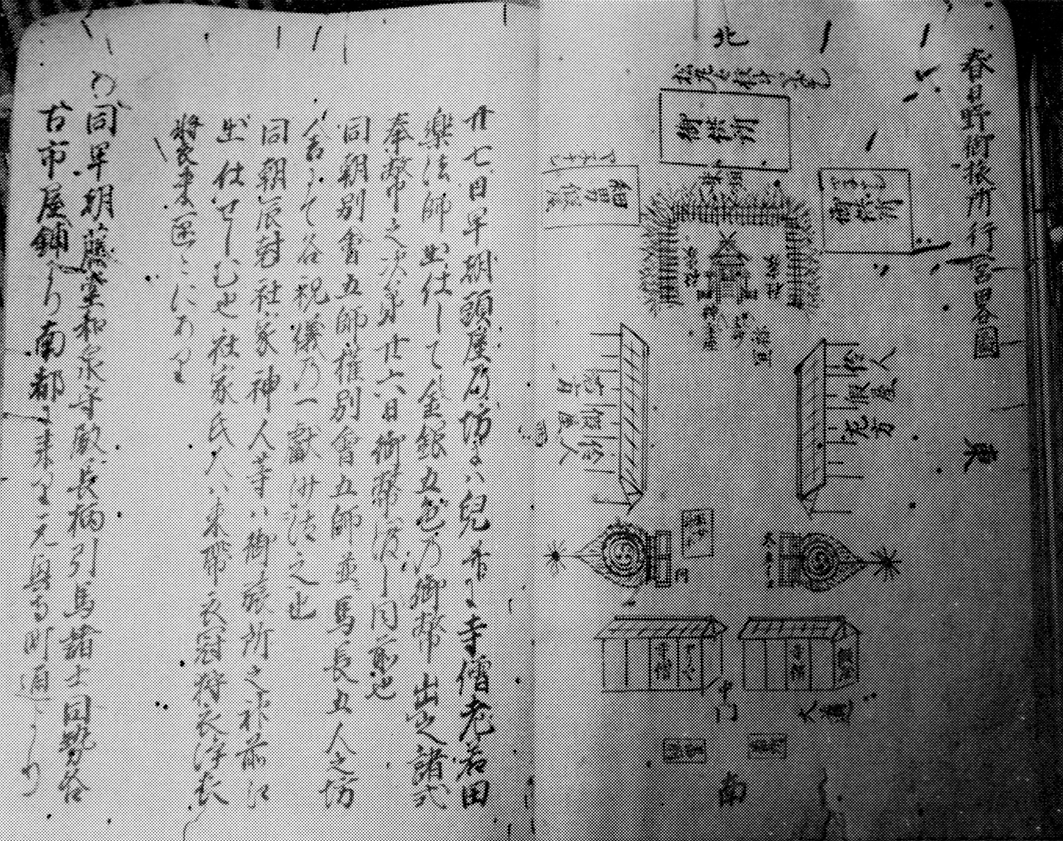 南都年中行事 村井古道自筆 春日野御旅所行宮略図